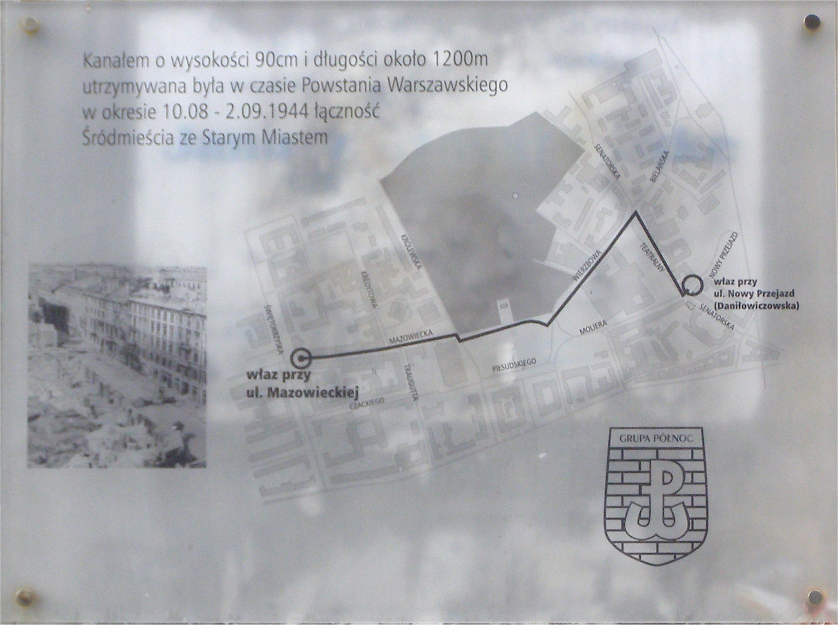 Tablica przy ul. Mazowieckiej w Warszawie (fot Zu)